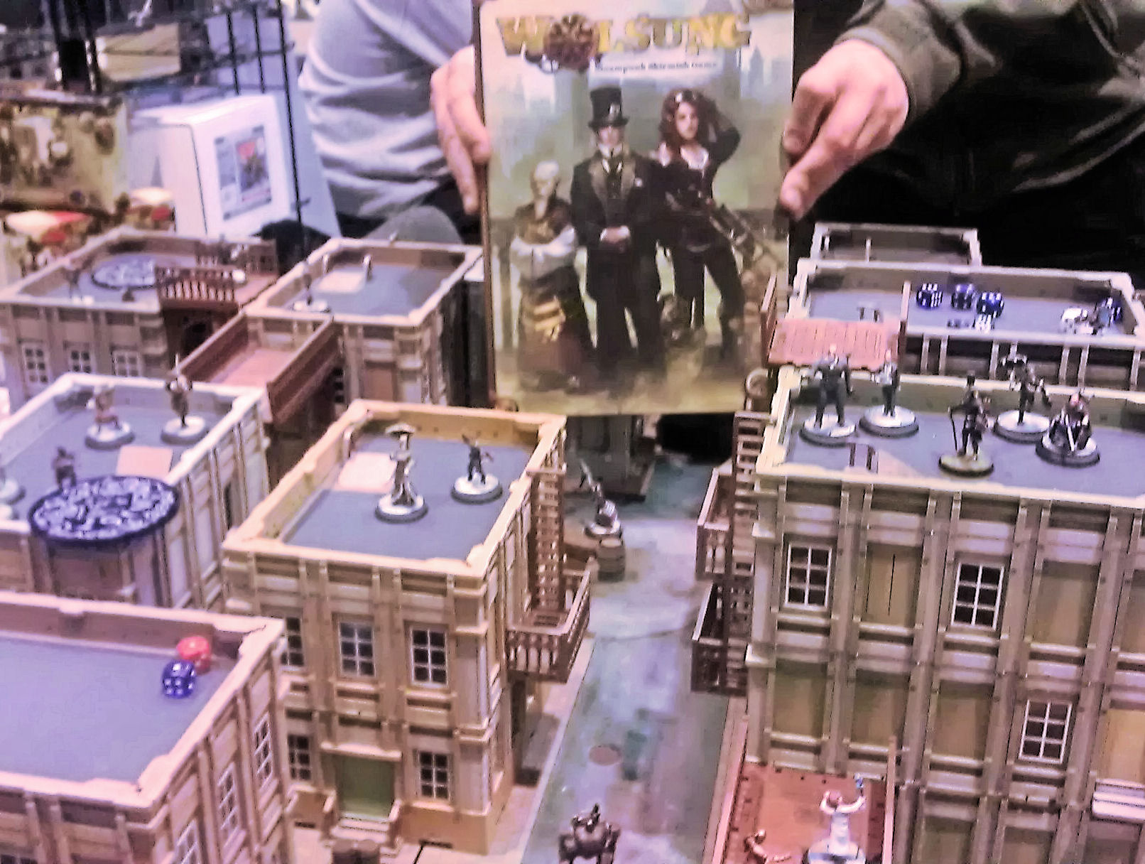 Makieta z gry Wolsung, wydawnictwo ISA, Pyrkon 2013, Poznań